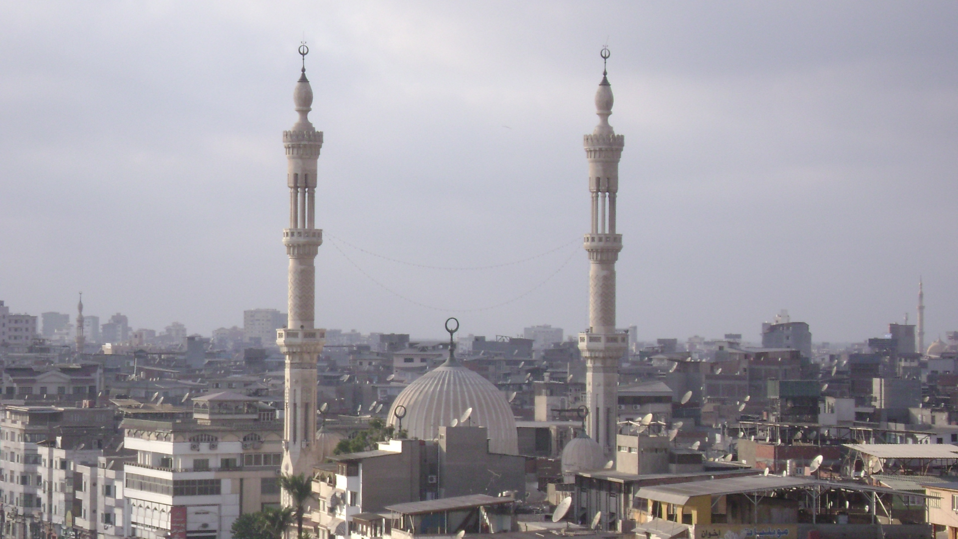 The two minarets and Dome of the al-Bahr Mosque المأذنتين والقبة الخاصة بجامع البحر بمدينة دمياط بكورنيش النيل